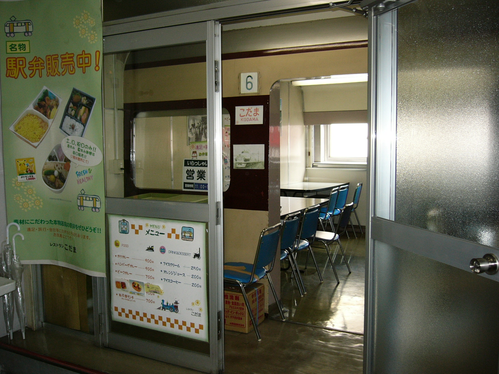 「こだま」に模しているエントランス。